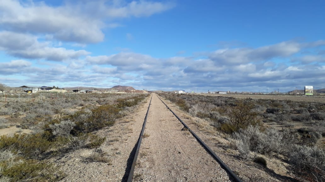 Anteriormente pantanos, Los Menucos actualmente presente un relieve semi árido.